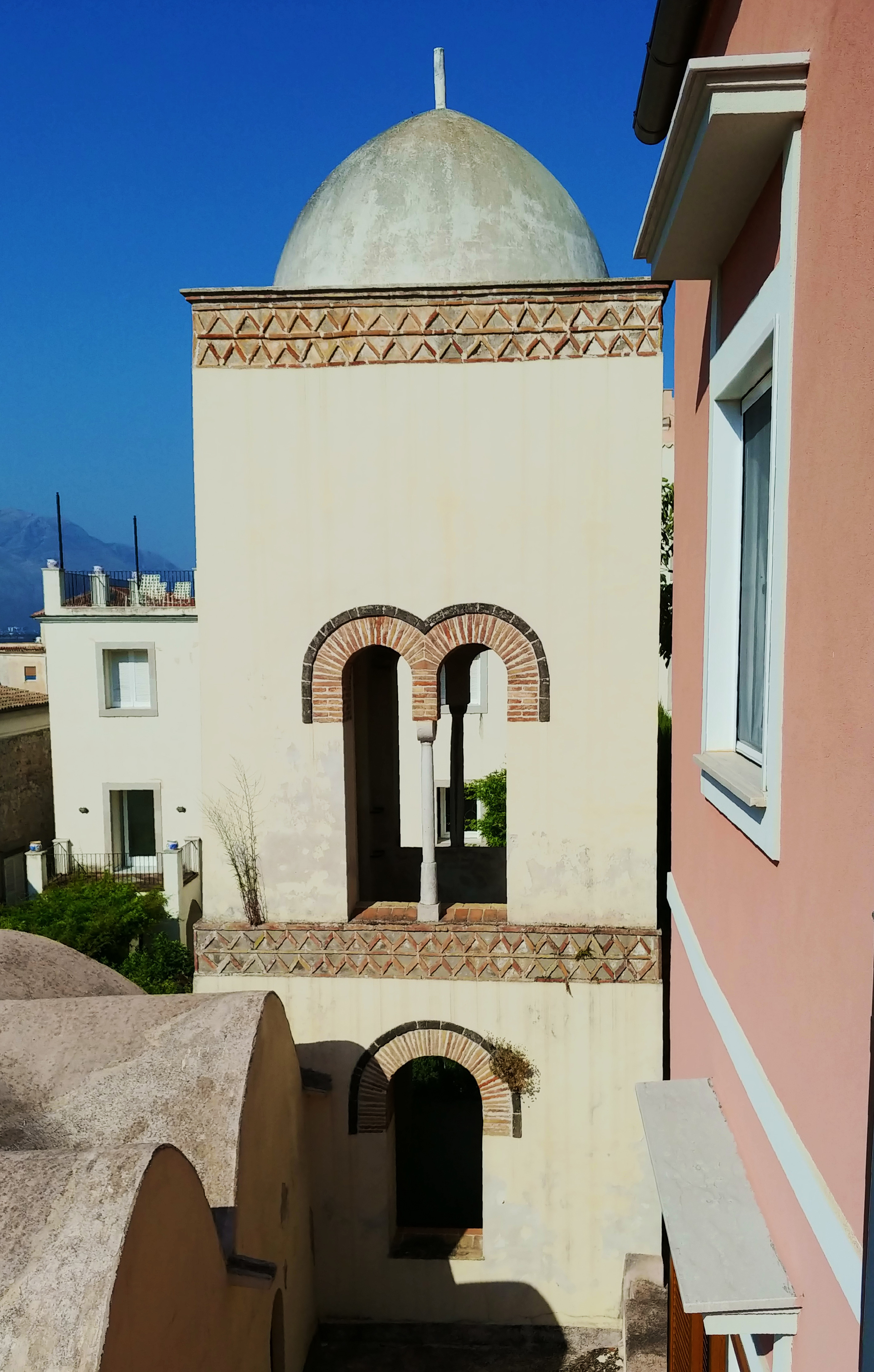 Campanile.